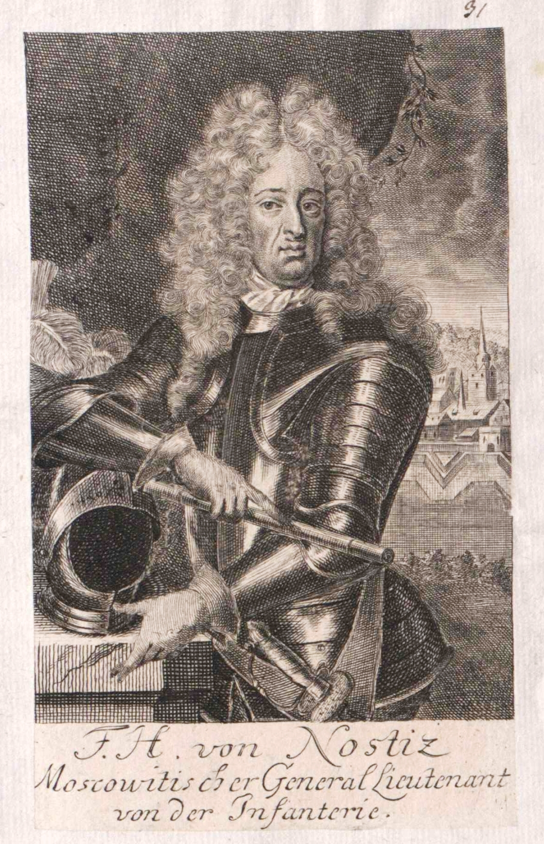 Frontispice to: Die Europäische Fama, Welche den gegenwärtigen Zustand der vornehmsten Höfe entdecket. 104.Theil, 1710, [HAB: Gba 26]